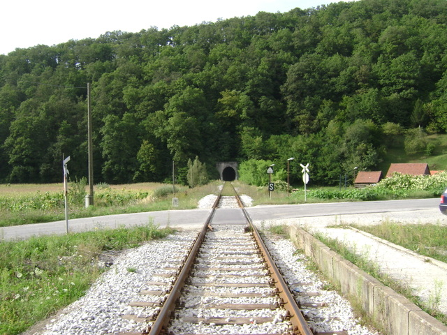 Stajalište Žutnica